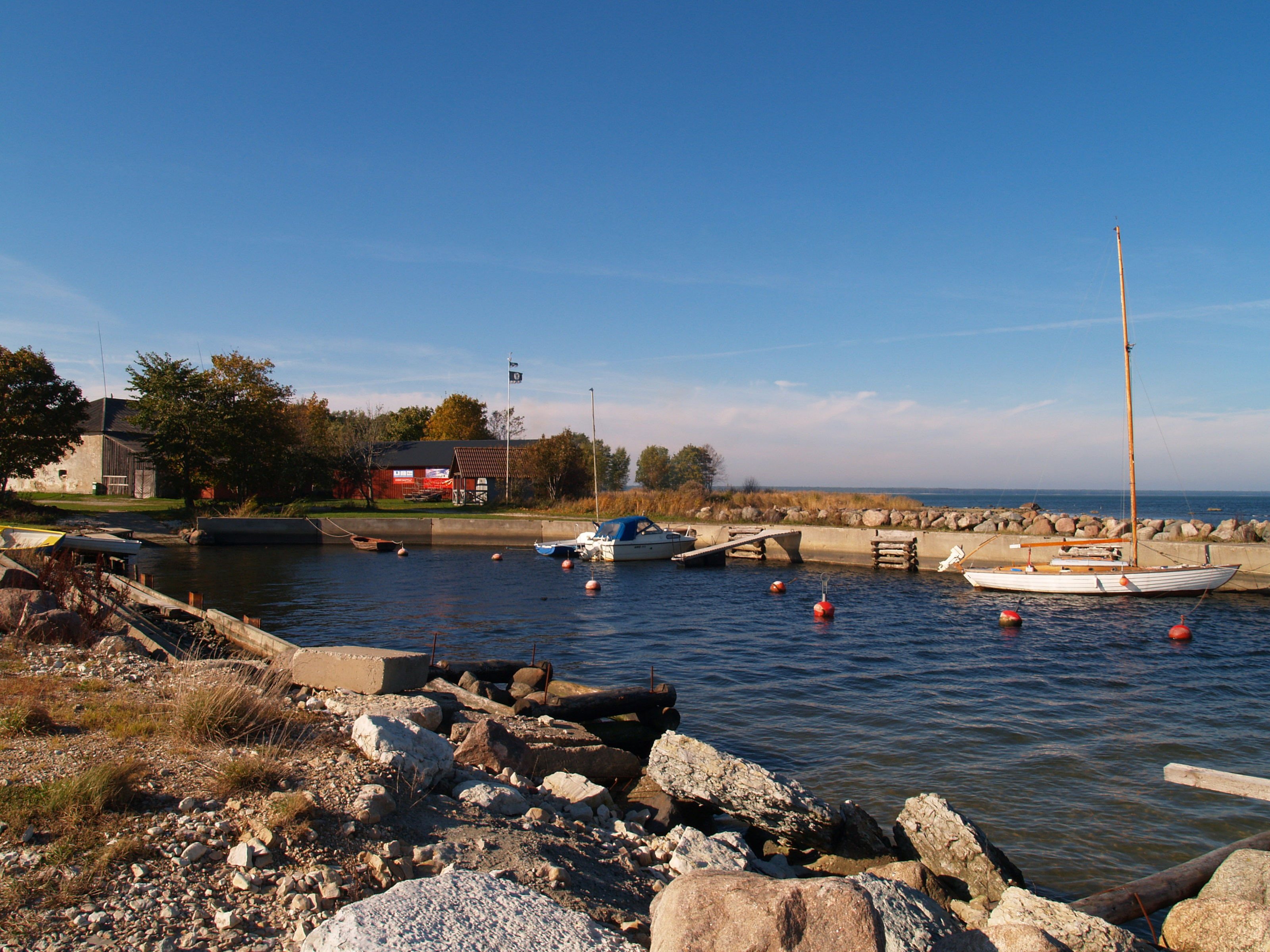 Kärdla sadam